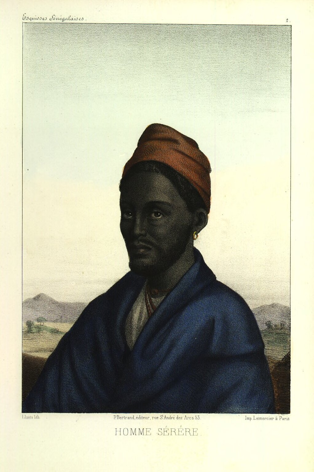 Homme sérère (Sénégal). Planche n° II de Esquisses sénégalaises de l'abbé Boilat, 1853. « Cette planche représente un Sérère de Mbissel, au royaume de Sine ; c’est un habile tisserand. »